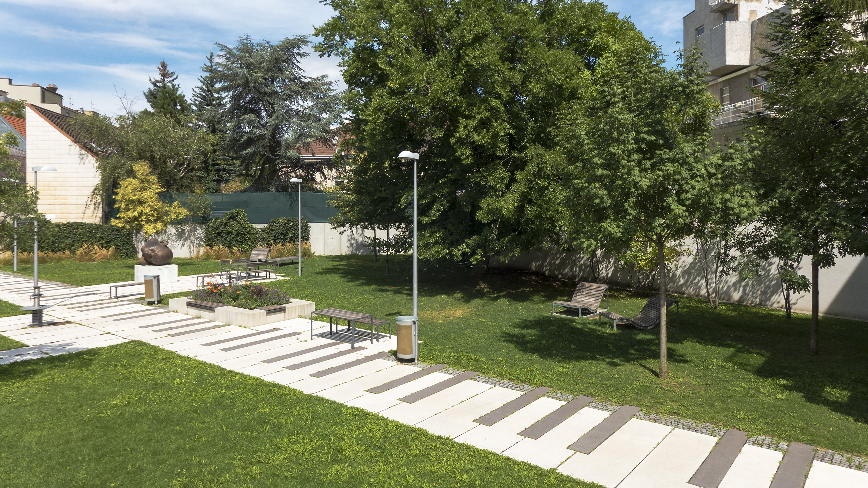 Friedrich-Gulda-Park in Wien 3